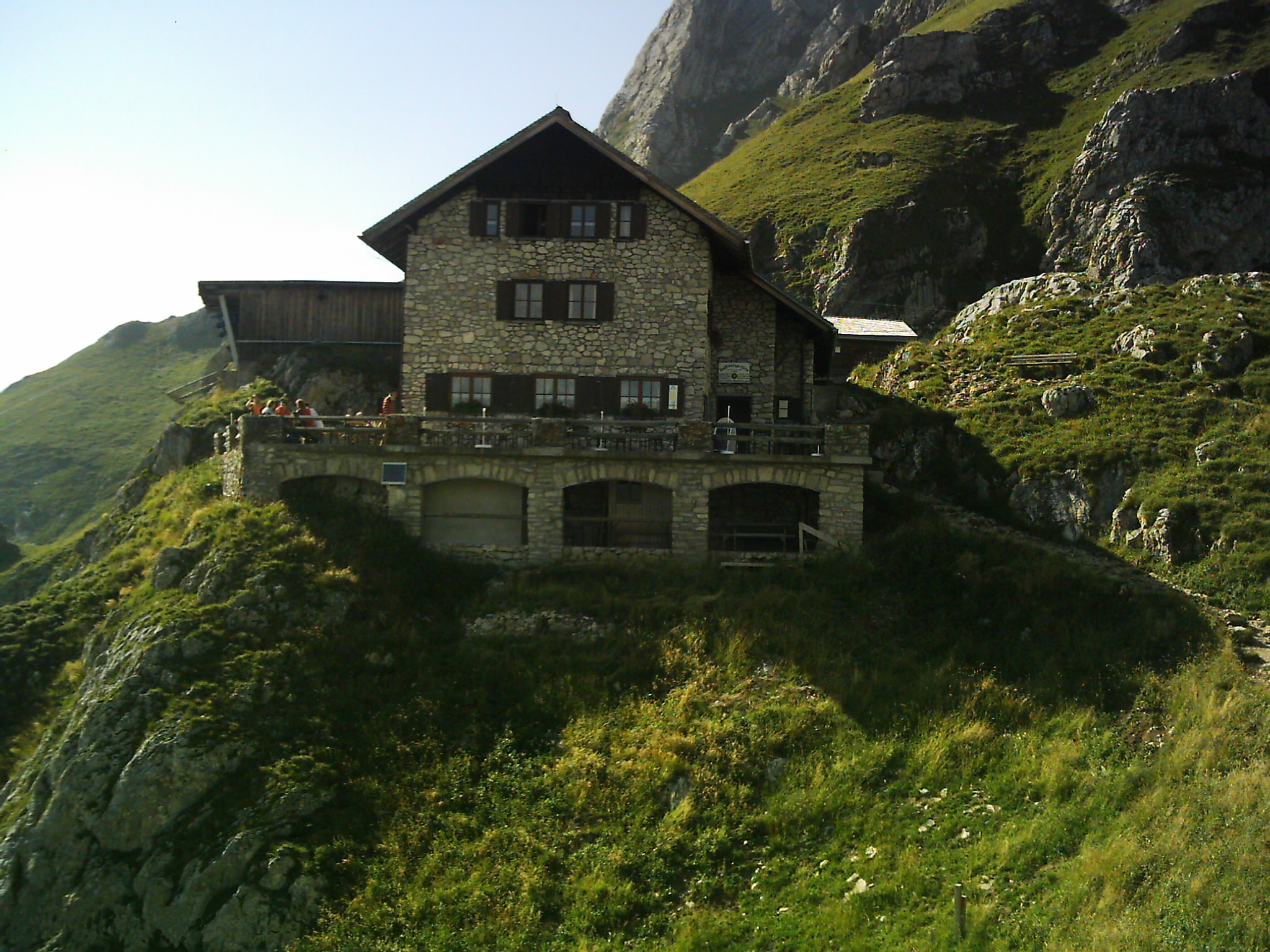 Bad Kissinger Hütte im Tannheimer Tal in Tirol (Außerfern), oberhalb von Grän